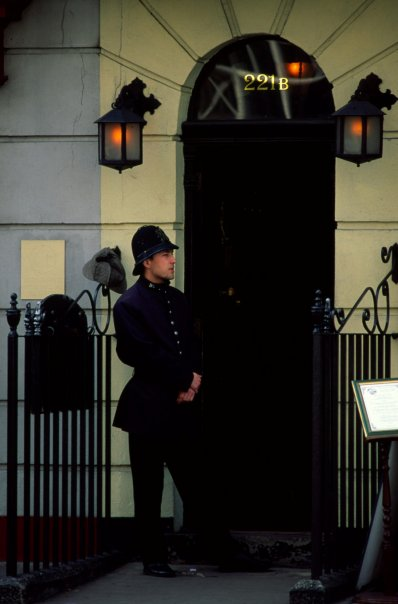 Photo by Enzo Mazzeo. Ticket:2009011810009627